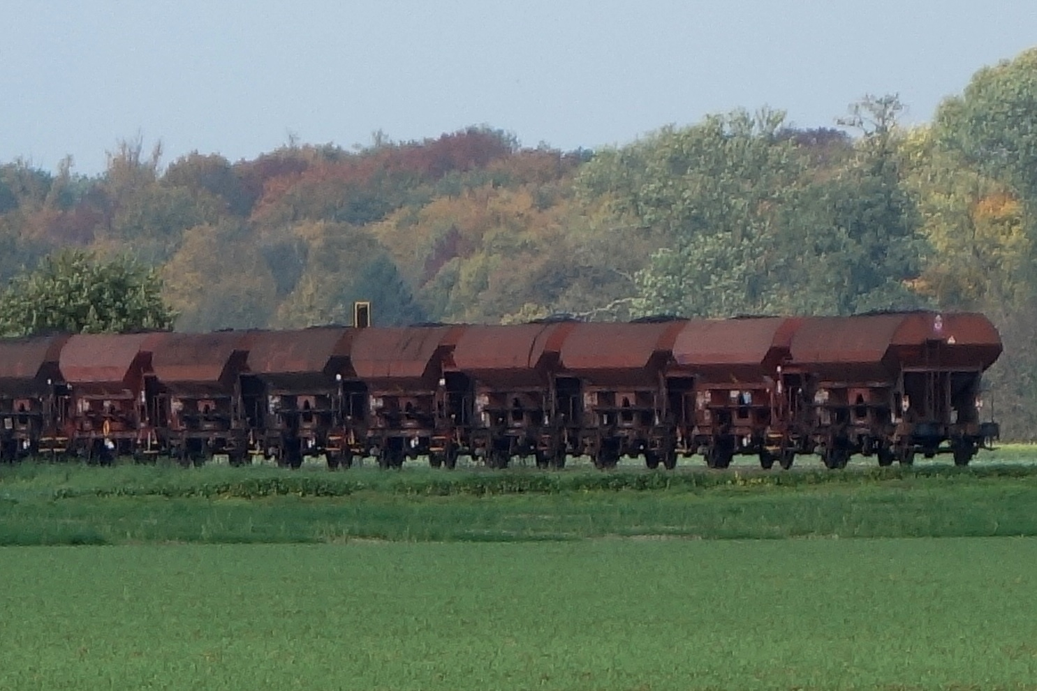 Zugschluss eines Kohlezuges mit Fc-Wagen zwischen Düren und Jülich